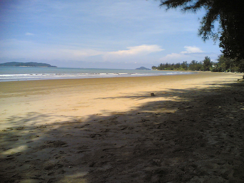 Luar pantai Tanjung Aru.